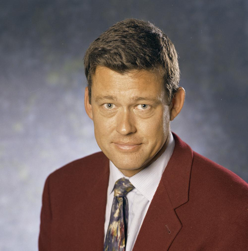 Charles Groenhuijsen.